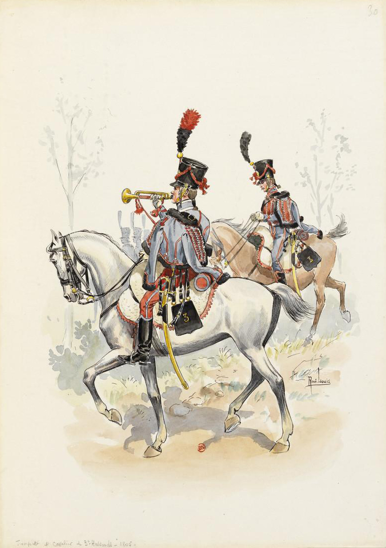 Trompette et cavalier du 3e Hussards en 1805.